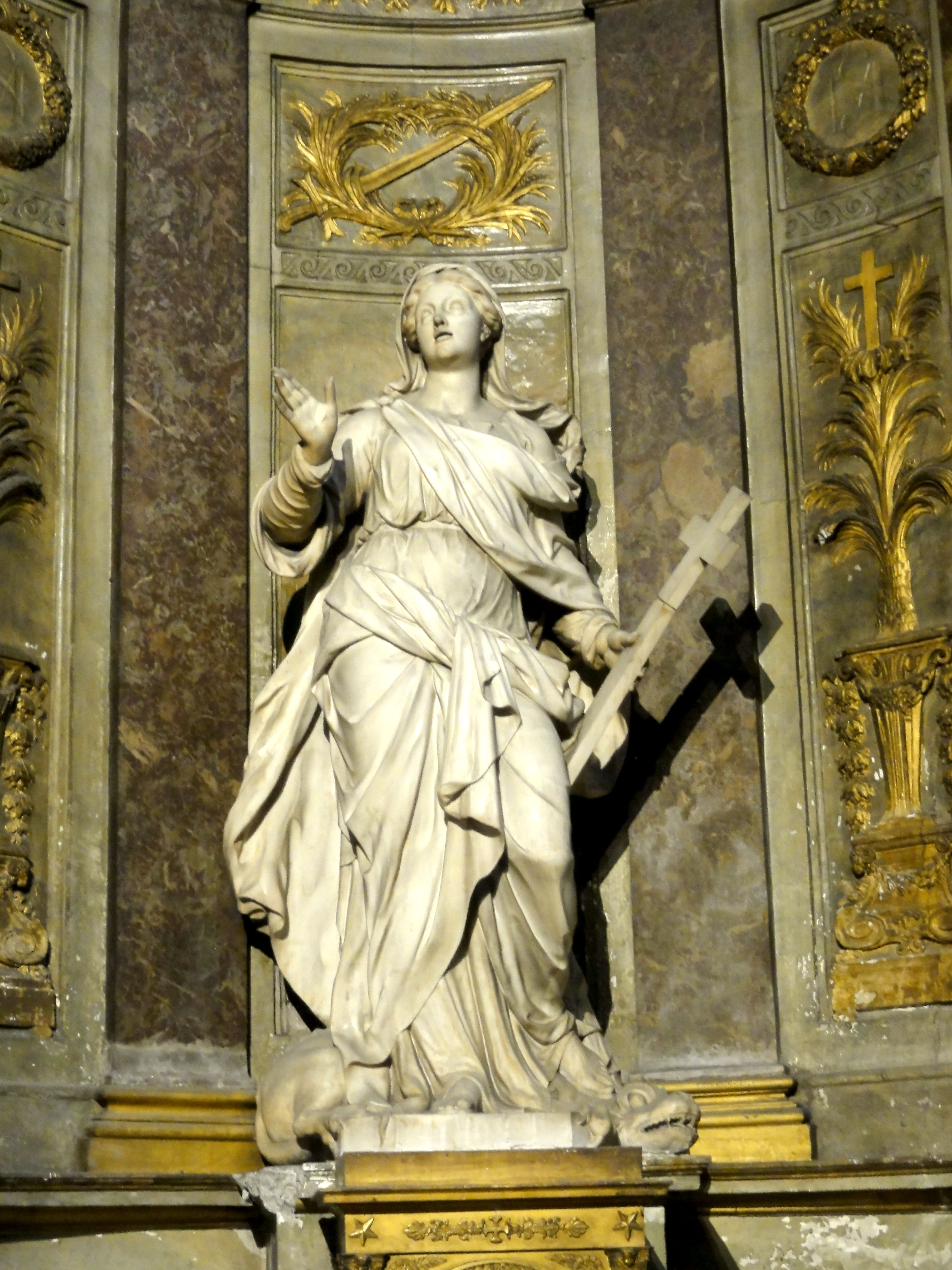 Chapelle Ste-Marguerite, statue de la même.